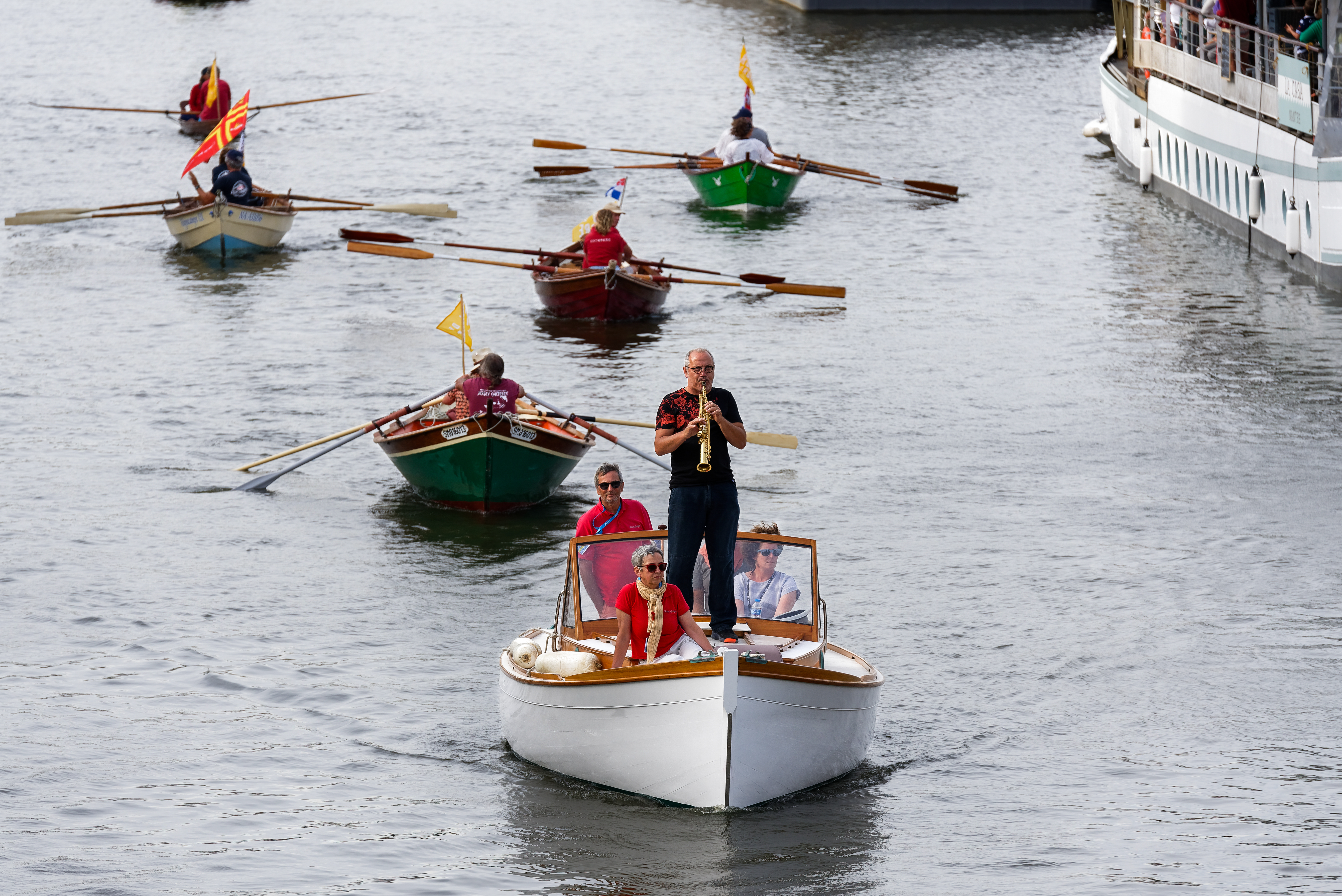 Rendez-vous de l’Erdre 2019 à Nantes : Le saxophoniste François Corneloup, photo depuis le pont Saint-Mihel. (Nantes, Loire-Atlantique, Pays de la Loire, France)